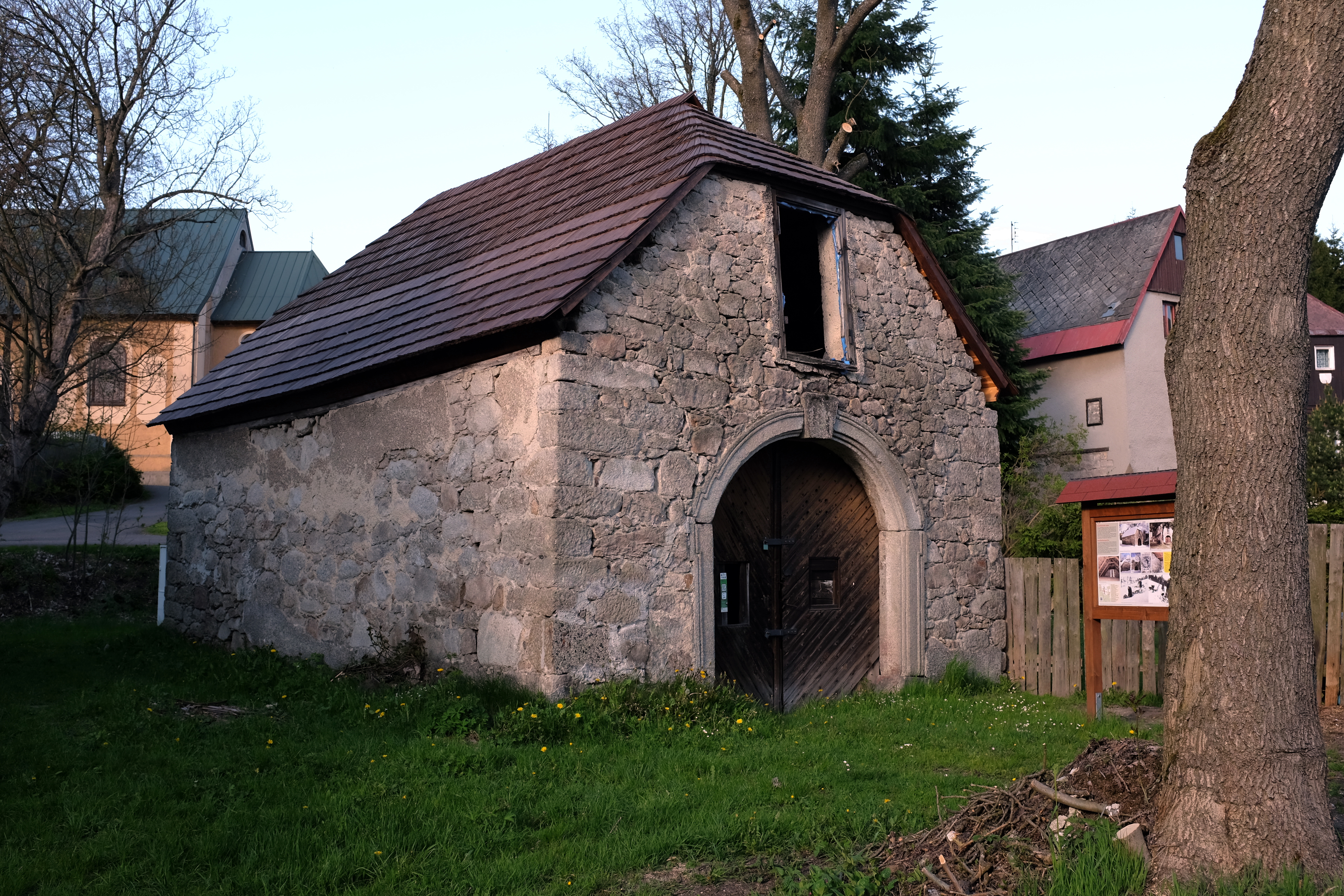 Pernink, obec v Krušných horách, Kontribučenská sýpka, okres Karlovy Vary